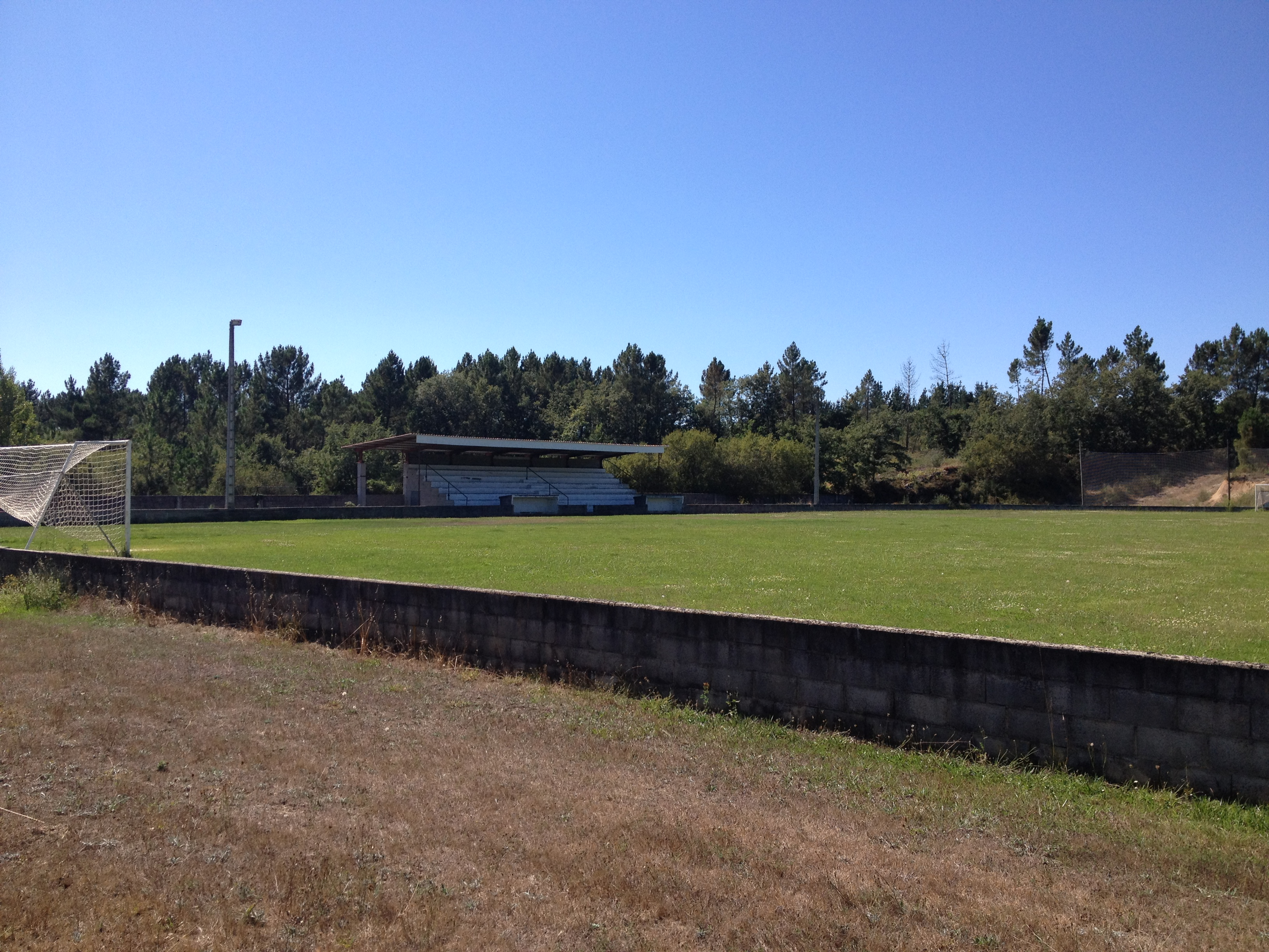 Campo de fútbol Os Medos. A Pobra do Brollón (Lugo).